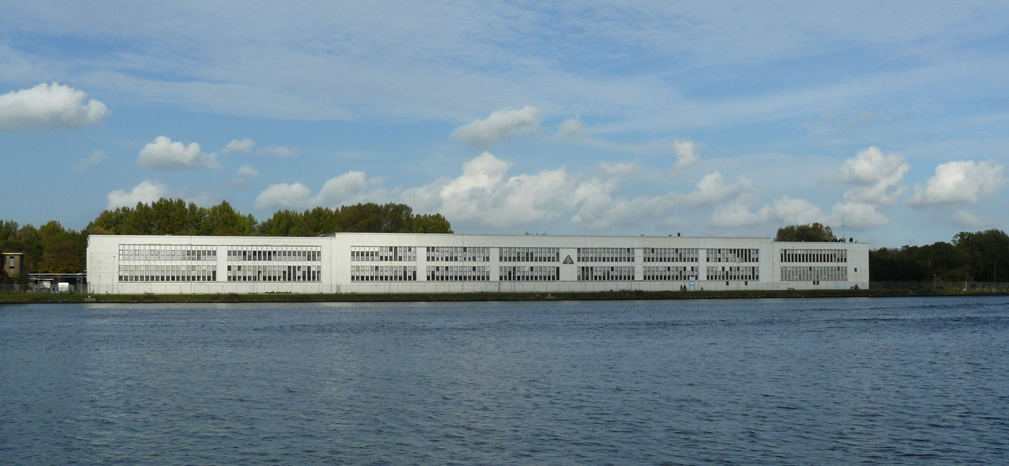 Gebouw 429 van de ArtillerieInrichting. Adres Hemkade 429, Amsterdam. Gezien vanaf het Noordzeekanaal (okt 0214)